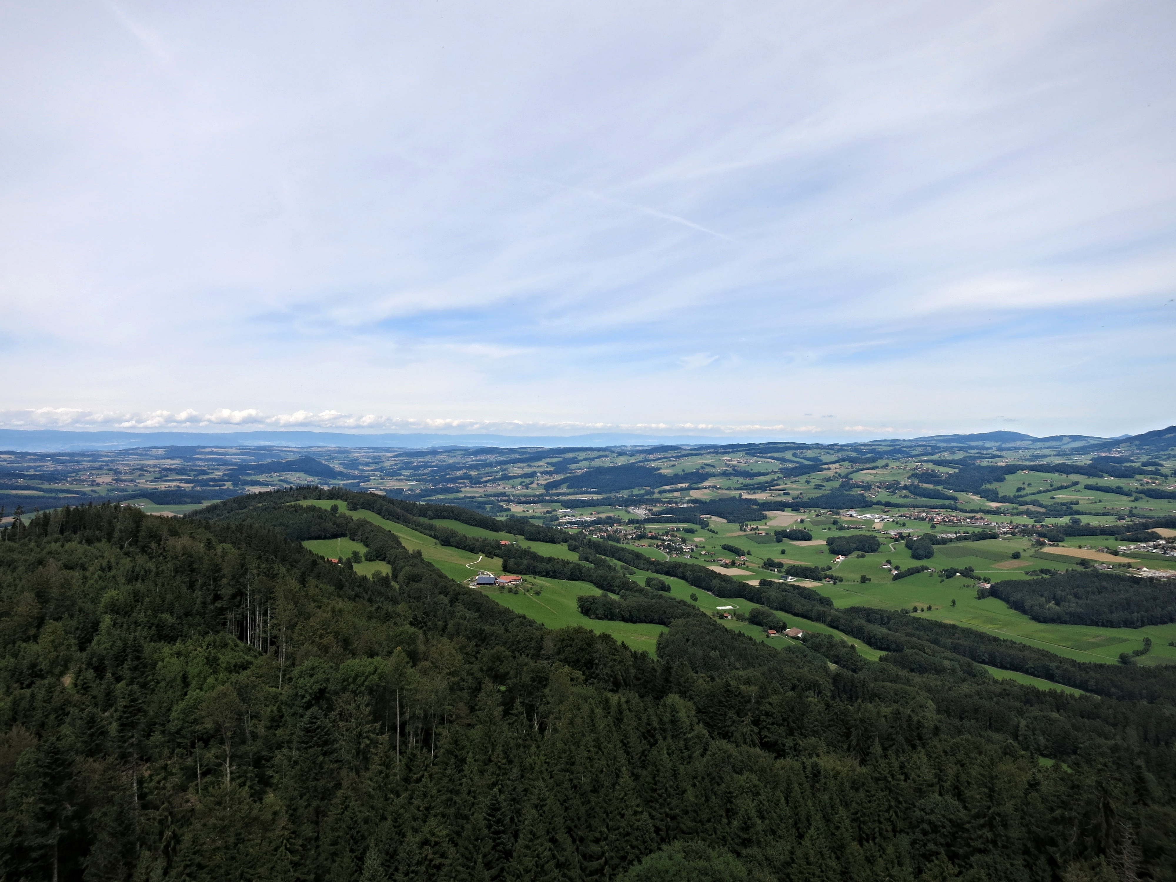 Aussicht vom Mont Pèlerin Fernsehturm Richtung Norden